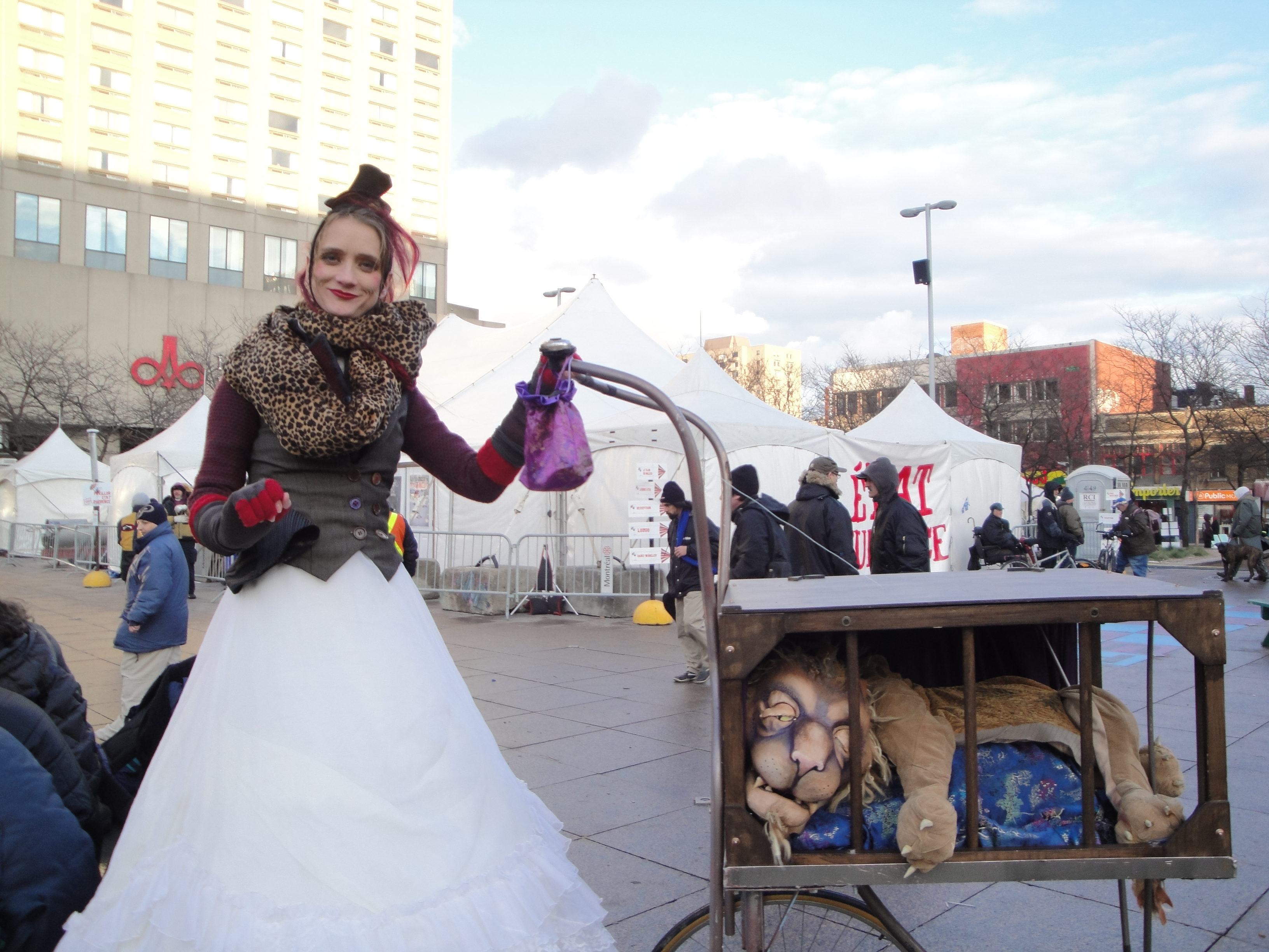 Les Poupées [K]rinquées de Julie Desrosiers, La montreuze, État d'Urgence 2010, Place Émilie-Gamelin, Montréal